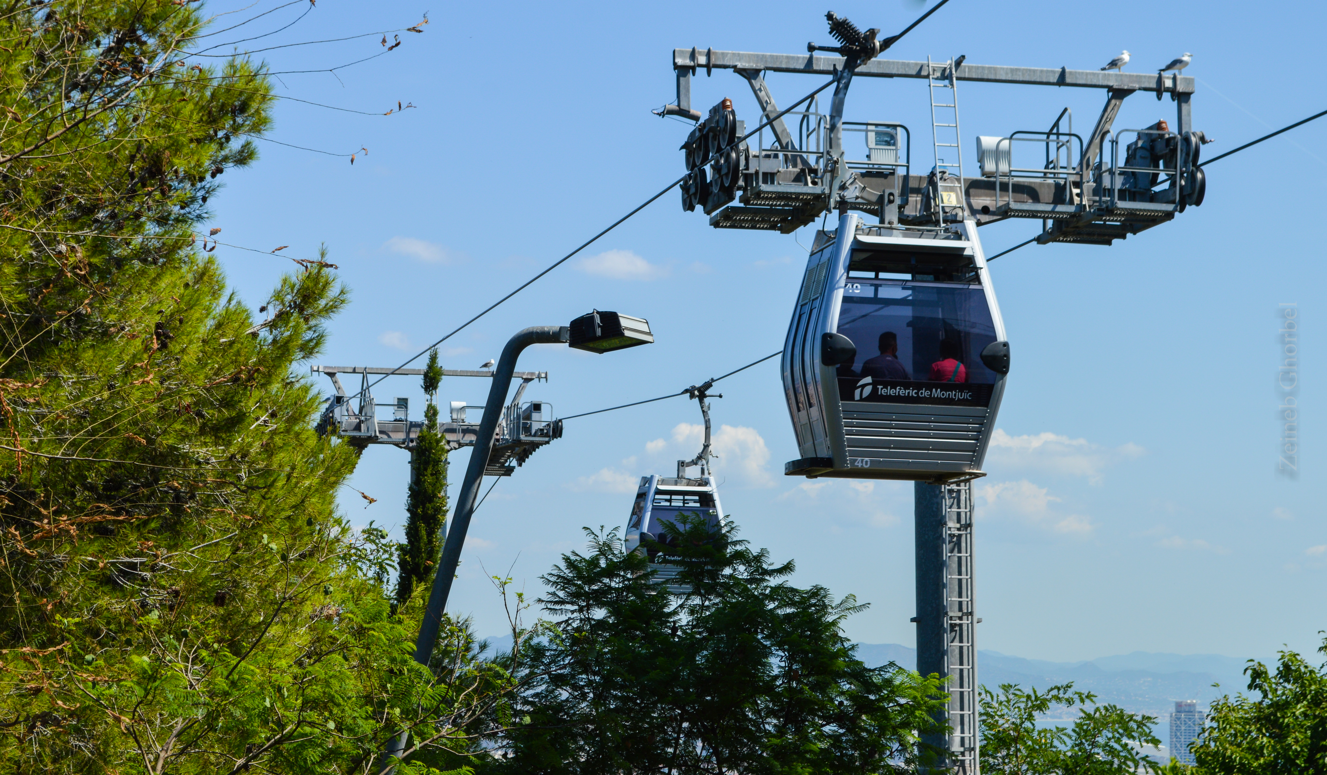 teleferic de montjuic (2018). Cabines sur la ligne.